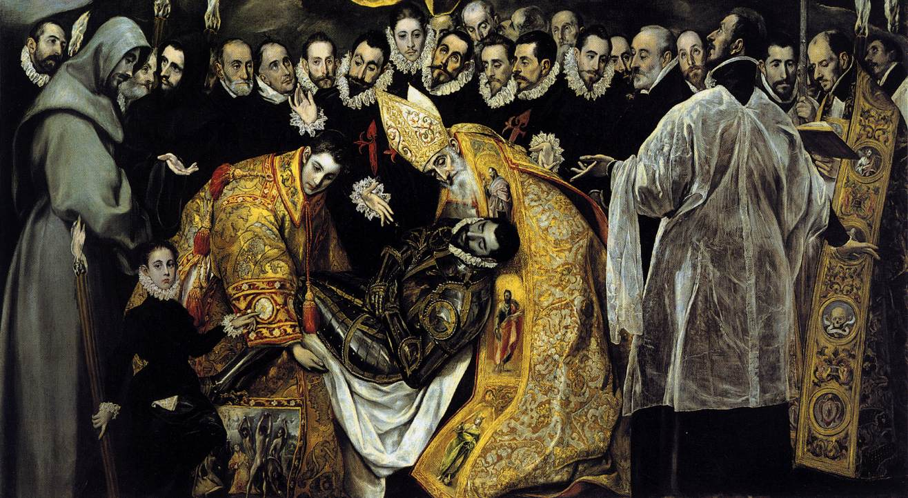 El entierro del señor de Orgaz, más conocido como El entierro del conde de Orgaz, es un óleo sobre lienzo pintado en estilo manierista por El Greco entre los años 1586 y 1588. Fue realizado para la iglesia de Santo Tomé de Toledo, (España), donde aun permanece, y es considerada una de las las mejores obras de su autor. El cuadro representa el milagro en el que, según la tradición, San Esteban y San Agustín de Hipona bajaron del Cielo para enterrar personalmente a Gonzalo Ruiz de Toledo, señor de la villa de Orgaz y fallecido en 1323, en la iglesia de Santo Tomé, como premio por su vida ejemplar de devoción, humildad y obras de caridad. El Greco aceptó el encargo de realizar la obra en 1586, algo más de dos siglos y medio después de los hechos que en ella representó.